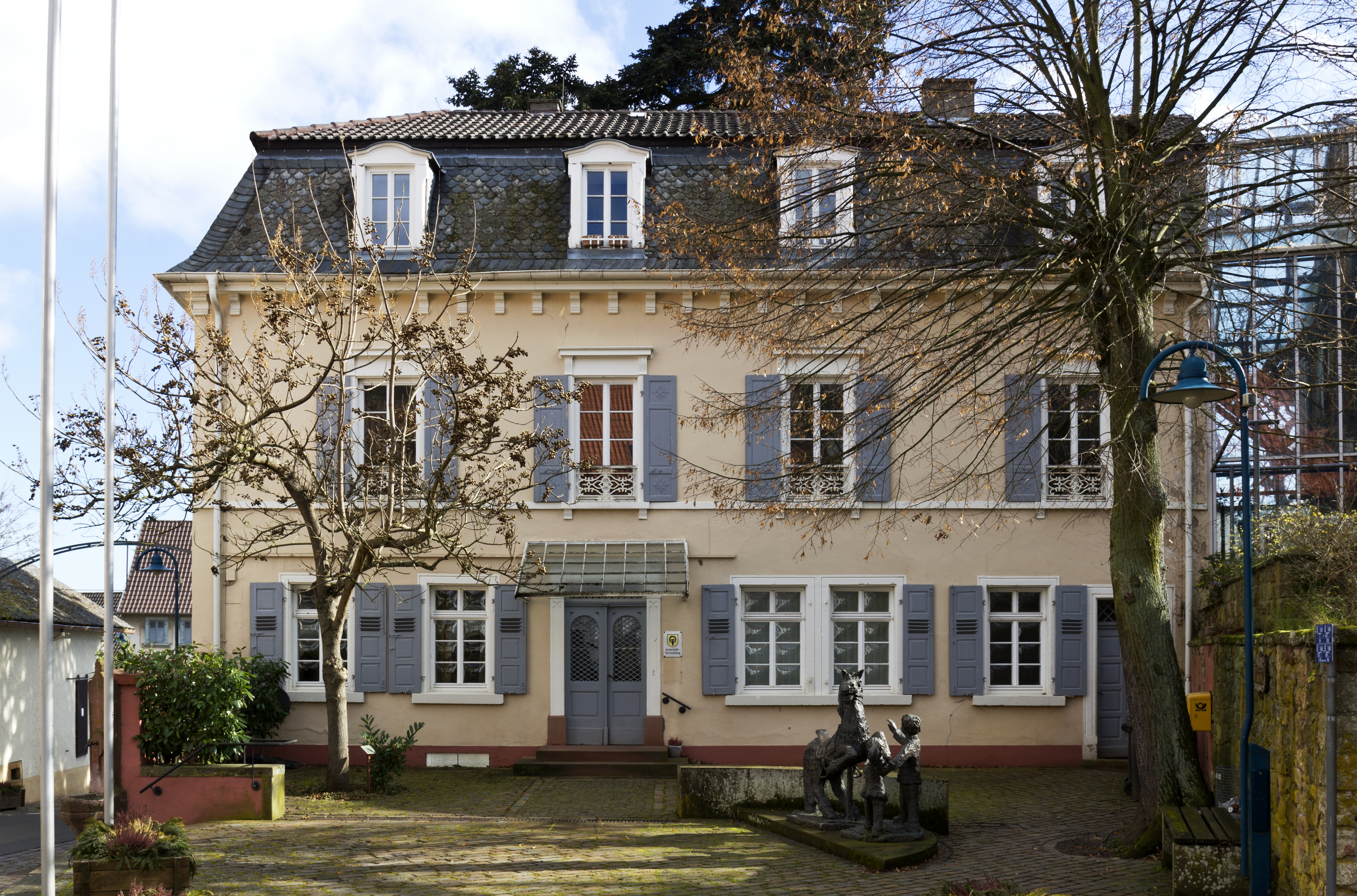 Gleisweiler, Gebäude der Gemeindeverwaltung